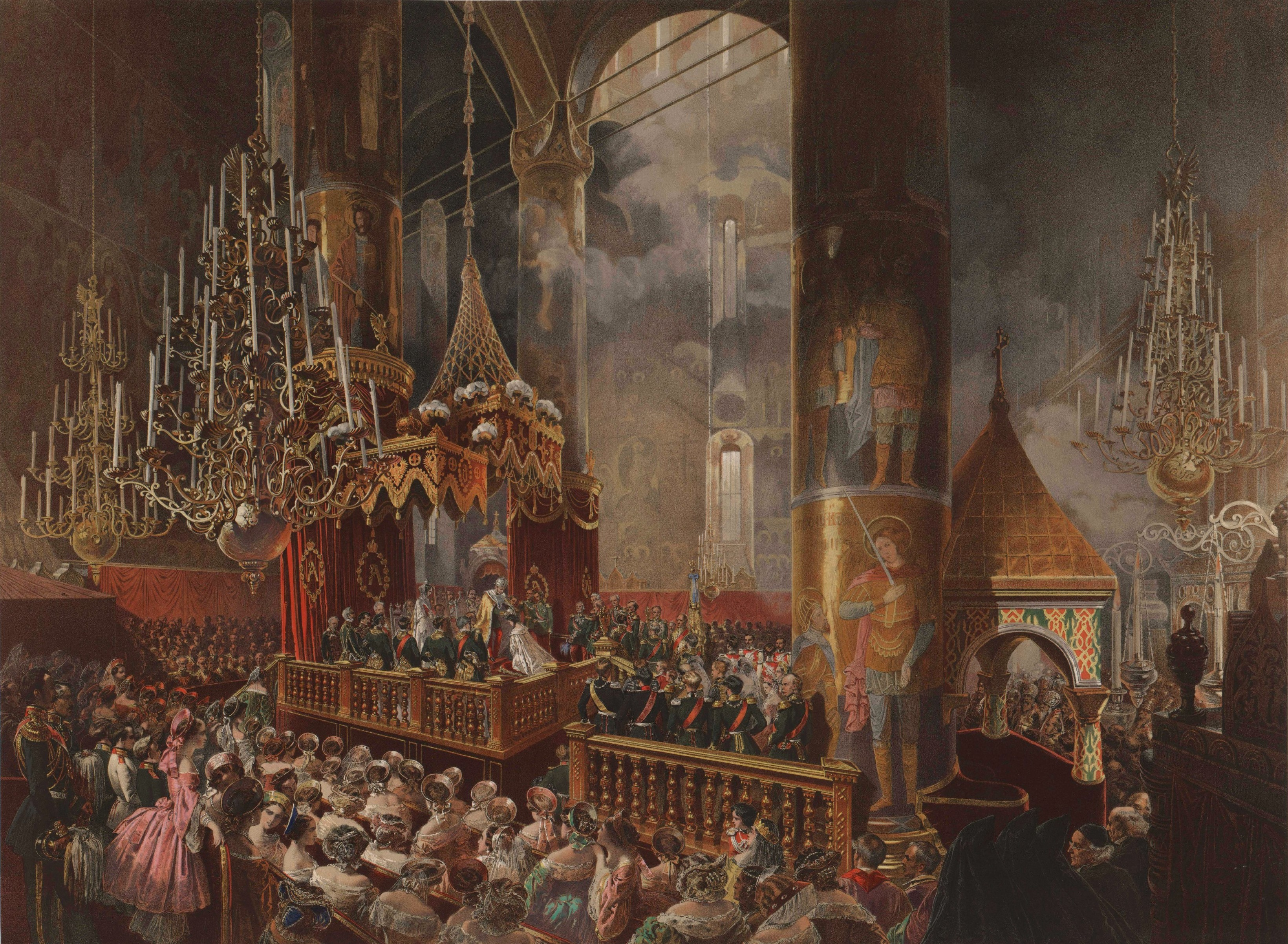 Внизу справа подпись и дата: Zichy 1857 Картон; акварель, гуашь, белила. 527 х 700 Происхождение: пост, в 1954 из ГМР Инв. № ЭРР-5431 Литература: Алешина 1975, с. 193; Описание 1856, л. 33-35 Изображен один из эпизодов коронационного чина – коронование “императором государыни императрицы”. Церемония коронации в России – большой государственный праздник, означающий освящение церковью власти монарха над страной. Со времени Ивана IV Грозного она происходила в Успенском соборе Московского Кремля. Торжественный чин венчания на царство, установленный при Иване Грозном, не менялся в последующие столетия. В центре собора сооружали специальное возвышение с парадным балдахином, к возвышению вели покрытые бархатом ступени. На помосте стояли троны. При коронации Александра II их было три. В центре трон Московского великого князя Ивана III – для императора, справа трон царя Михаила Федоровича – для молодой императрицы и слева трон царя Алексея Михайловича – для вдовствующей императрицы Александры Федоровны, матери Александра II. Коронация проходила по определенному ритуалу: после чтения молитв митрополит подносил императору порфиру и корону, которую император надевал сам, а затем принимал от митрополита скипетр. В ритуал входило также коронование императрицы, опускавшейся перед императором на колени, который возлагал ей на голову малую корону. Этот момент и запечатлел на акварели М. Зичи. Позади императорской четы стоят их ассистенты – великие князья и генерал-адъютанты. На площадке ниже члены царской семьи, представители европейских дворов, справа внизу иерархи православной церкви. Датировка акварели 1857 г. означает, что Зичи повторял ее по желанию кого-либо из высокопоставленных заказчиков.